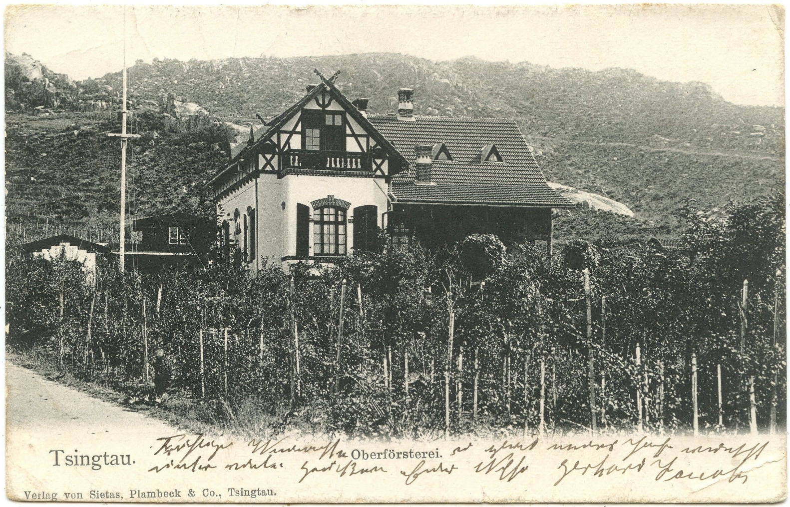 青岛高等山林局